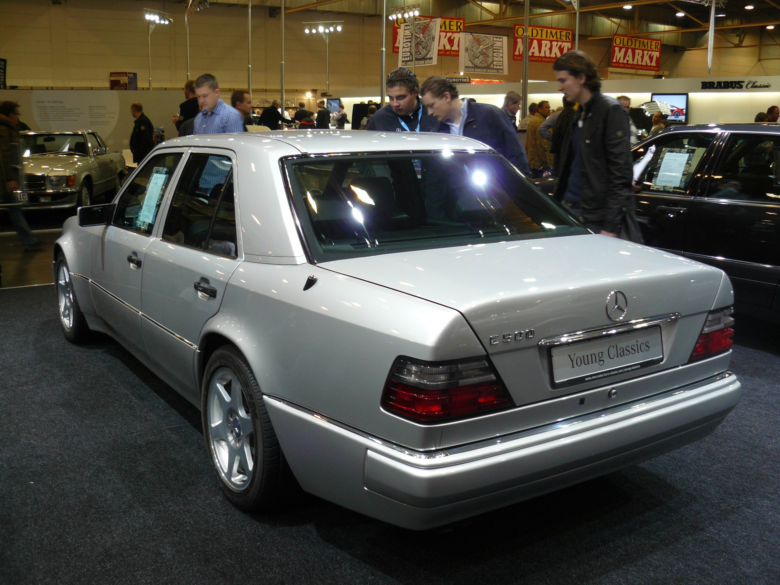 Français cadien: Essen 2011